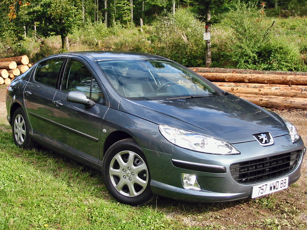 Peugeot 407 Modèle : Executive 1,6 HDi FAP Photographie personnelle, prise le 24 août 2006 Copyright © Christian Amet